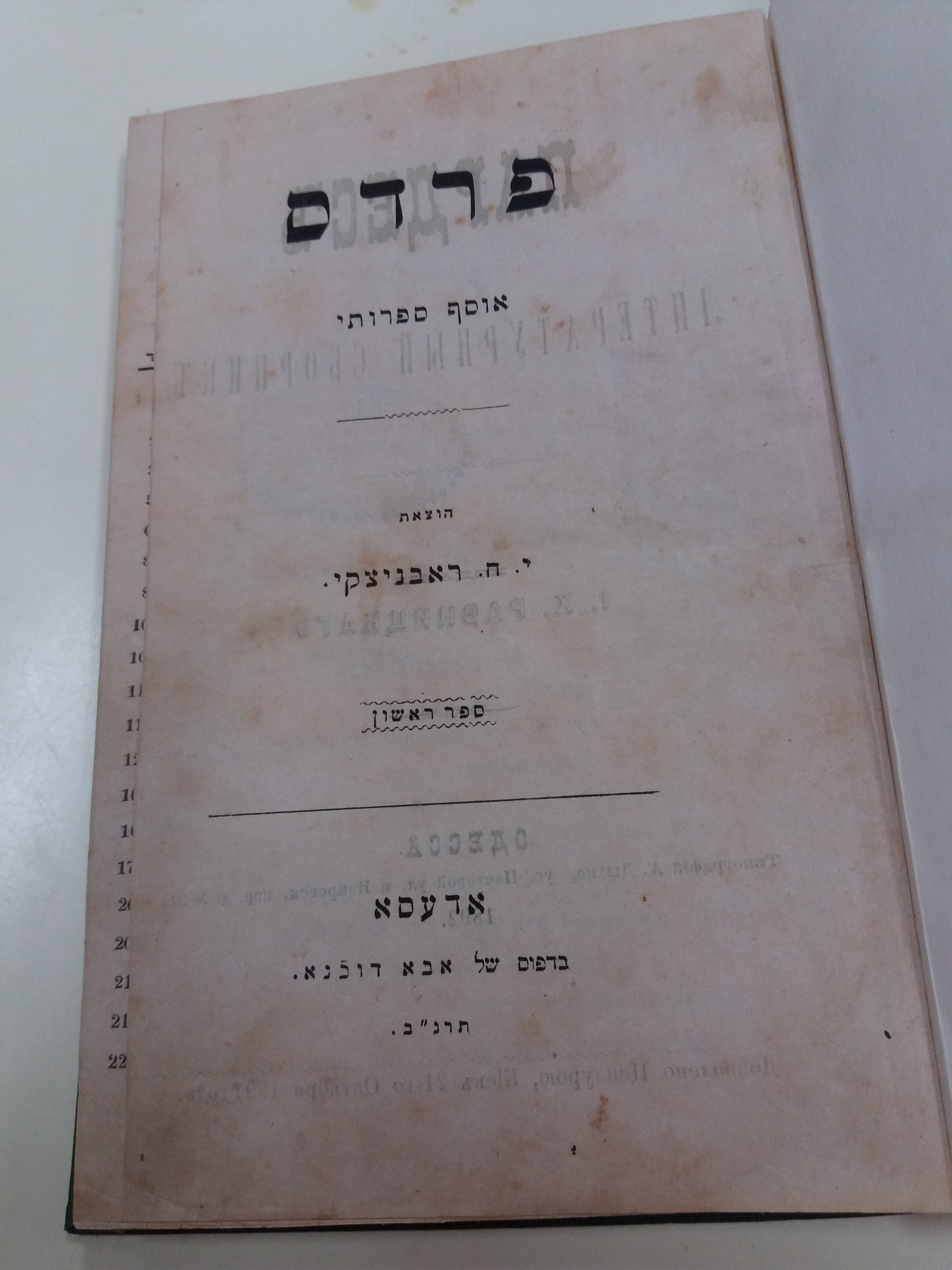 דף השער בכתב העת "פרדס" (1892 - 1896), אודסה, בהוצאתו ועריכתו של יהושע חנא רבניצקי, ( 1859 - 1944